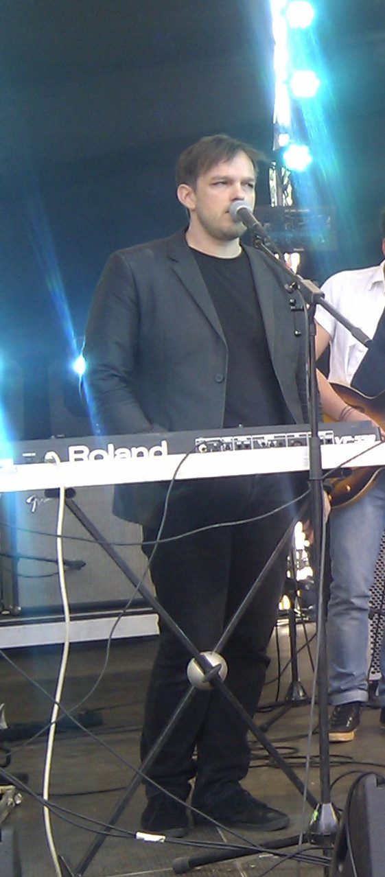 René Arbeithuber mit Gender Bombs beim Pfingsttheatron 2013, München